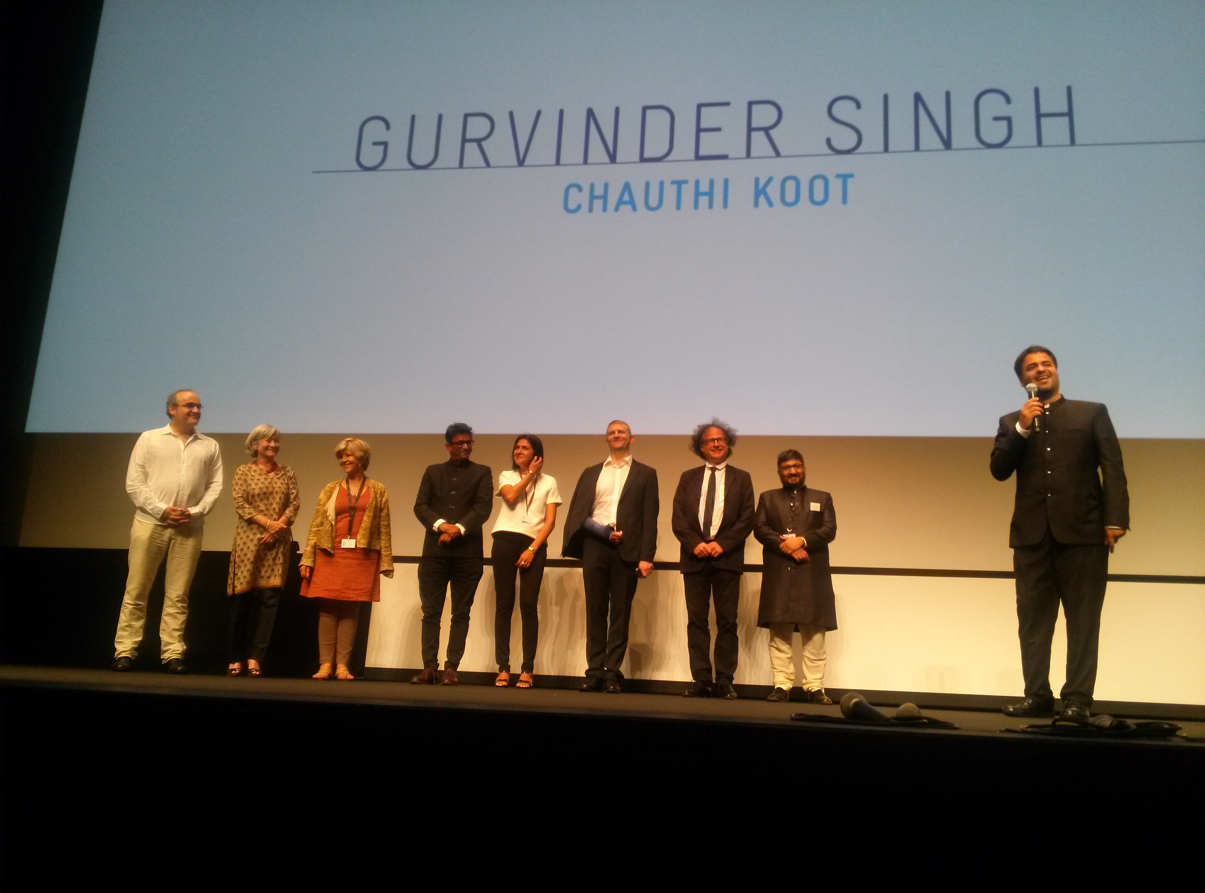 Présentation du film The Fourth Direction de Gurvinder Singh à Un certain regard à Cannes 2015.